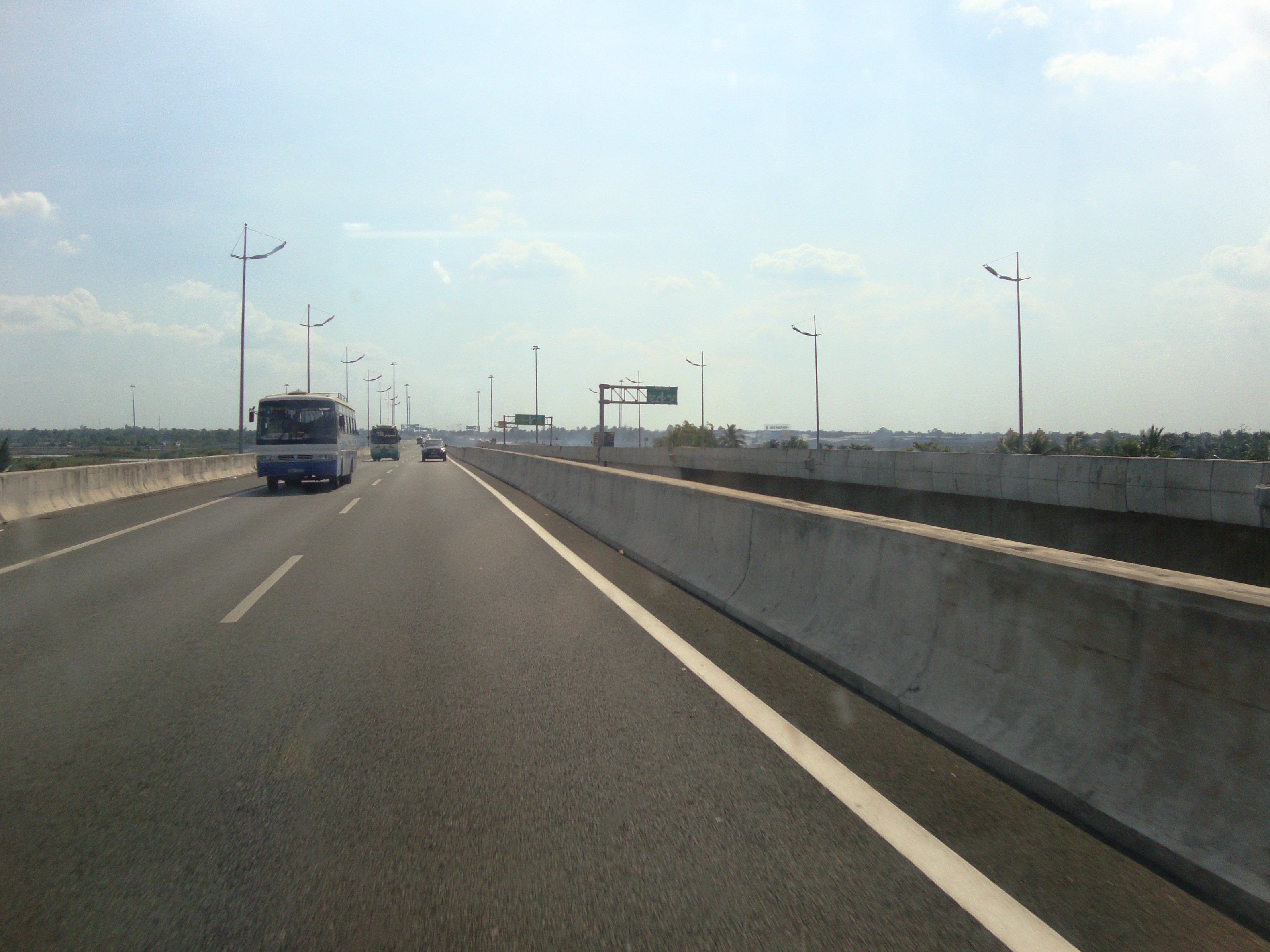 Đường cao tốc Thành phố Hồ Chí Minh - Trung Lương, một phần của Đường cao tốc Bắc - Nam, Việt Nam. Đoạn đường qua thành phố Tân An, tỉnh Long An.